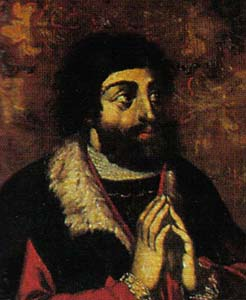 Summary Duque de Viseu Licensing 19:51, 27 Fevereiro 2006 L Gonçalves 246x300 (29435 bytes) (Duque de Viseu)